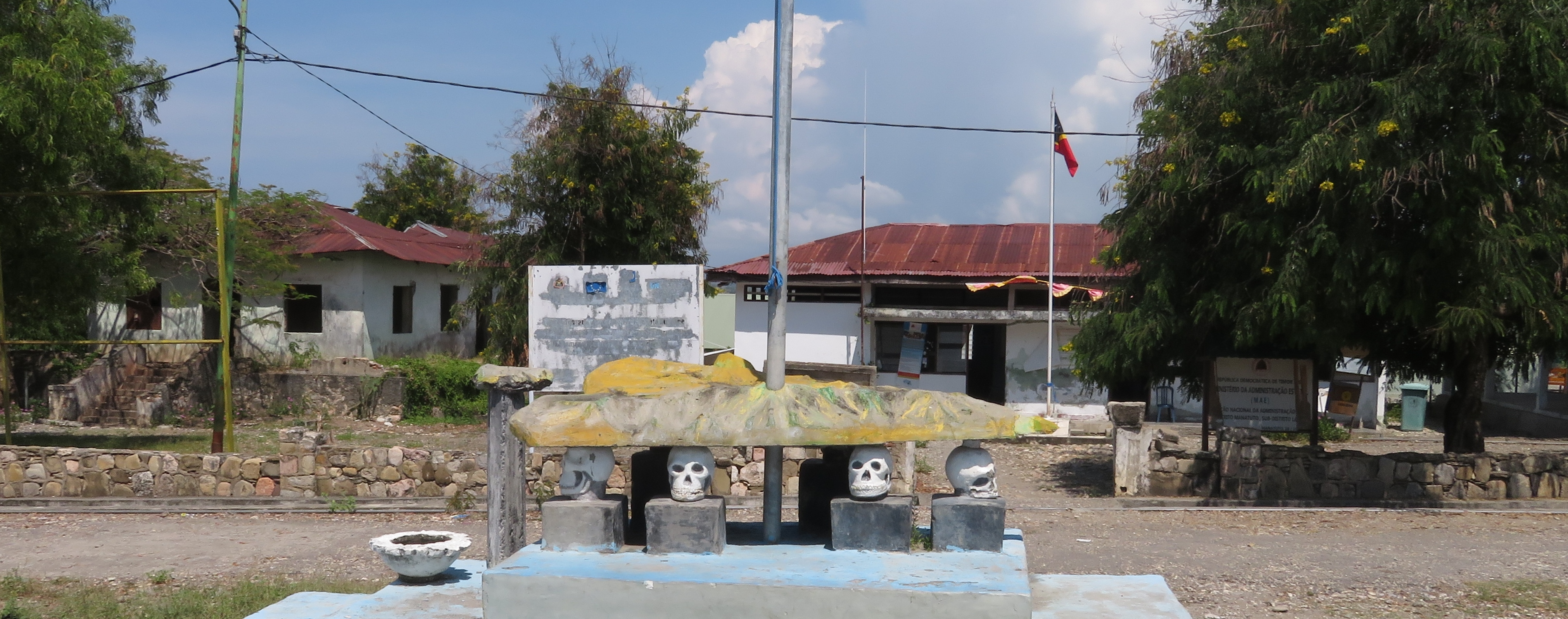 Monumento no centro da vila, Laleia, Timor Leste